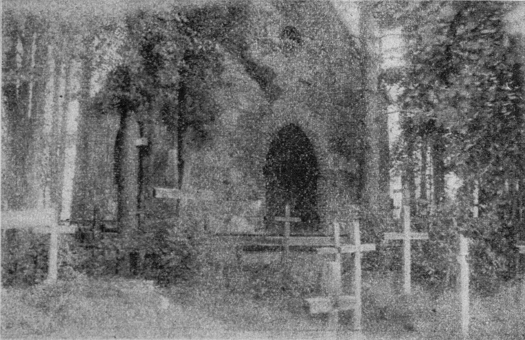 Беларуская (тарашкевіца): Дурынічы (Duryničy). Капліца-пахавальня Забелаў (Zabieła)